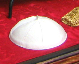 White papal zucchetto